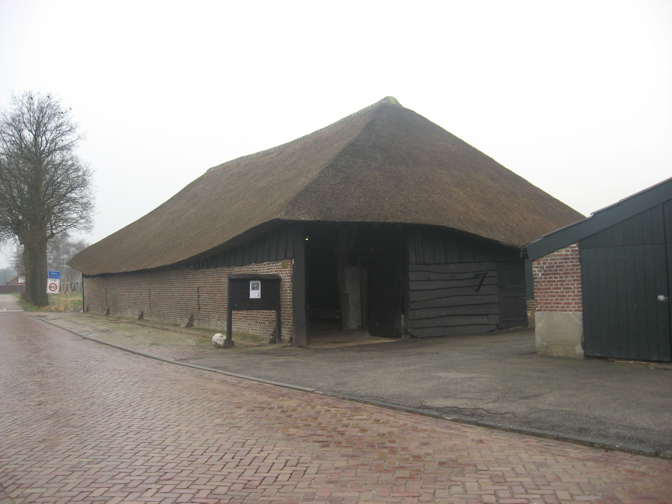 Rijksmonument in Gilze Vlaamse schuur, voormalig schuurkerk